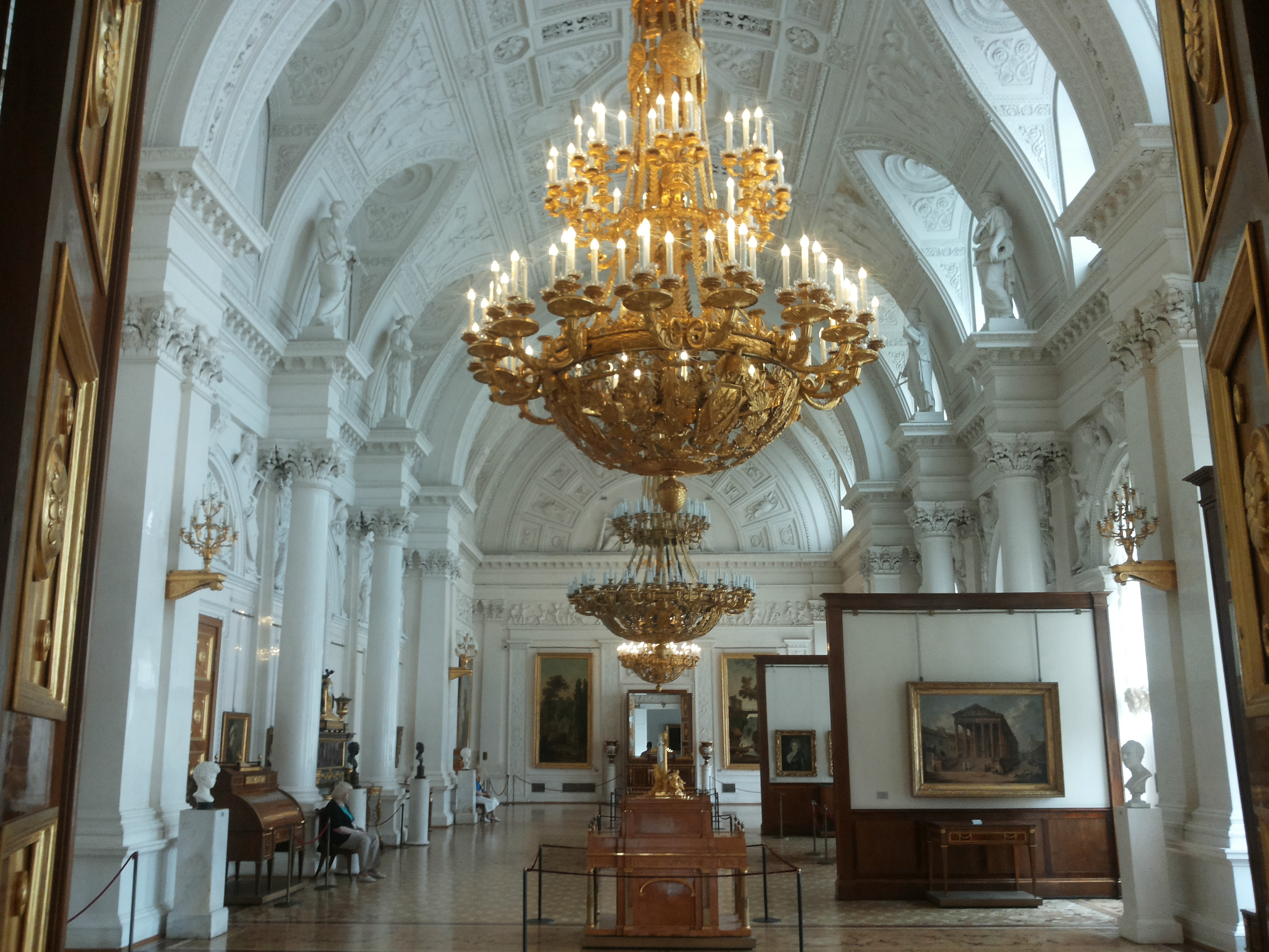 San Pietroburgo - Palazzo d'Inverno, museo dell'Hermitage